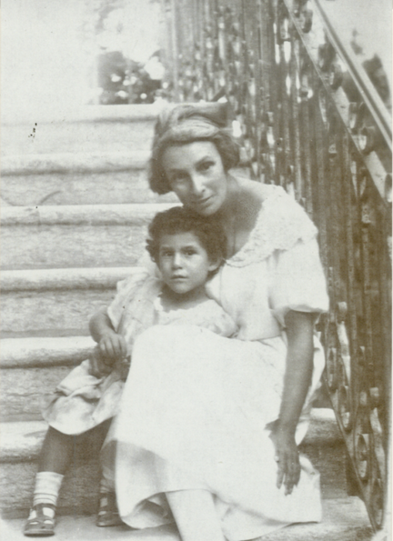 ישע סמפטר וביתה תמר